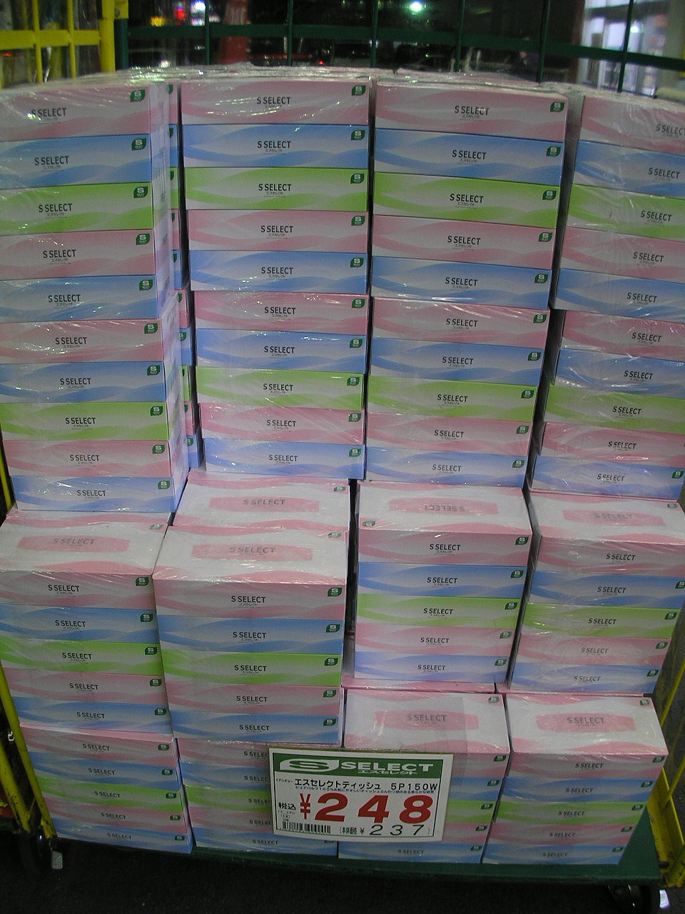 ティッシュペーパーボックスティッシュ